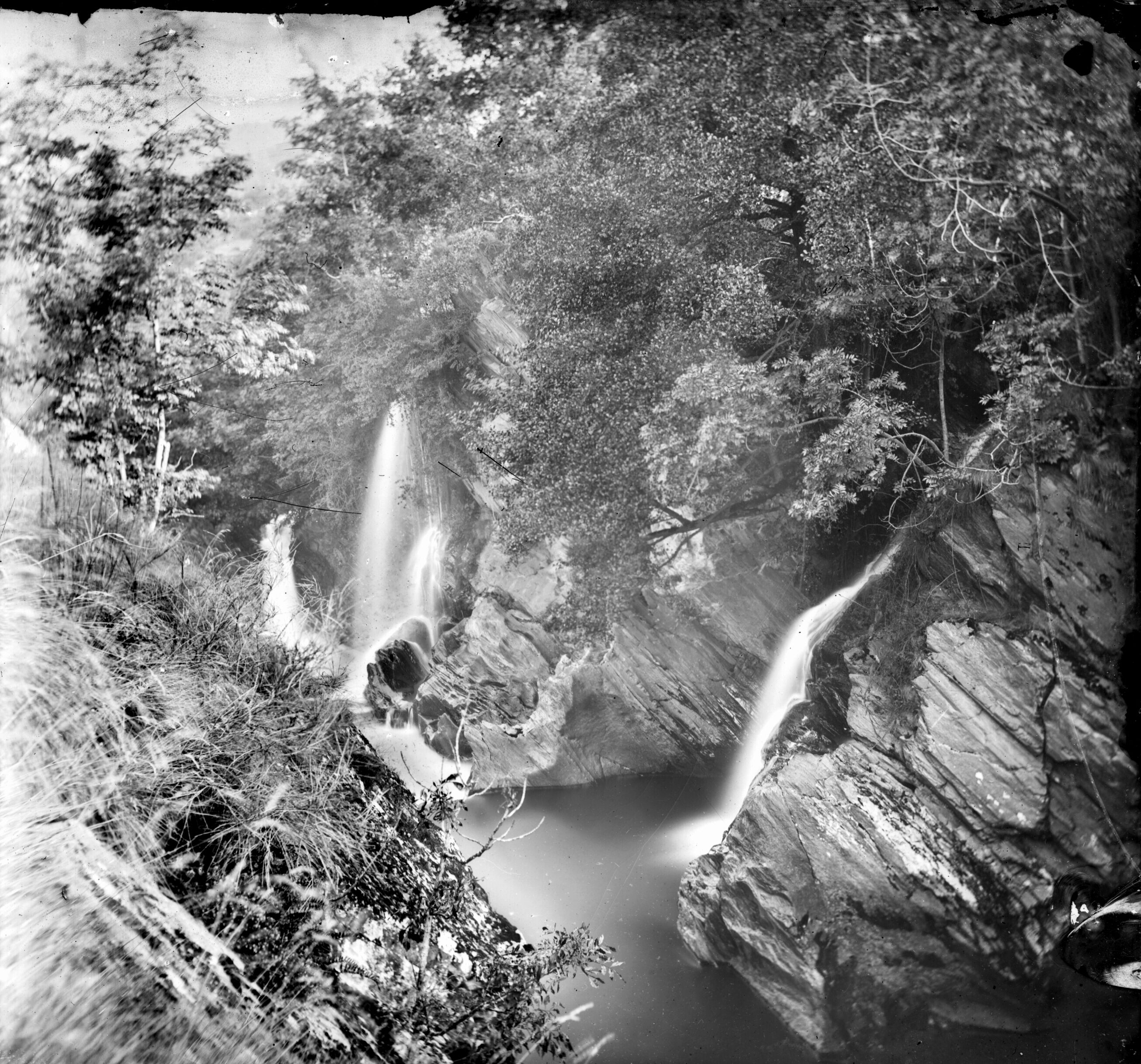 Fonds Trutat - Photographie ancienne Cote : TRU C 382 Localisation : Fonds ancien Original non communicable Titre : Gouffre et cascades du Castelet, à 1 heure d'Ax-les-Thermes Auteur : Trutat, Eugène Rôle de l’auteur : Photographe Lieu de création : Ax-les-Thermes (Ariège ; canton) Date de création : : 19e siècle, 4e quart Mesures : 8 x 8 cm Mot(s)-clé(s) : -- Cours d'eau -- Cascade -- Gouffre -- Végétation -- Rocher -- Pyrénées (France) -- Ariège (France ; haute vallée) -- Ax-les-Thermes (Ariège ; canton) -- Perles-et-Castelet (Ariège) -- 19e siècle, 4e quart Médium : Photographies Médium : Positifs sur plaque de verre -- Noir et blanc -- Paysages Voir : TRU C 2548 Gouffre et cascades du Castelet, à 1 heure Bibliothèque de Toulouse. Domaine public